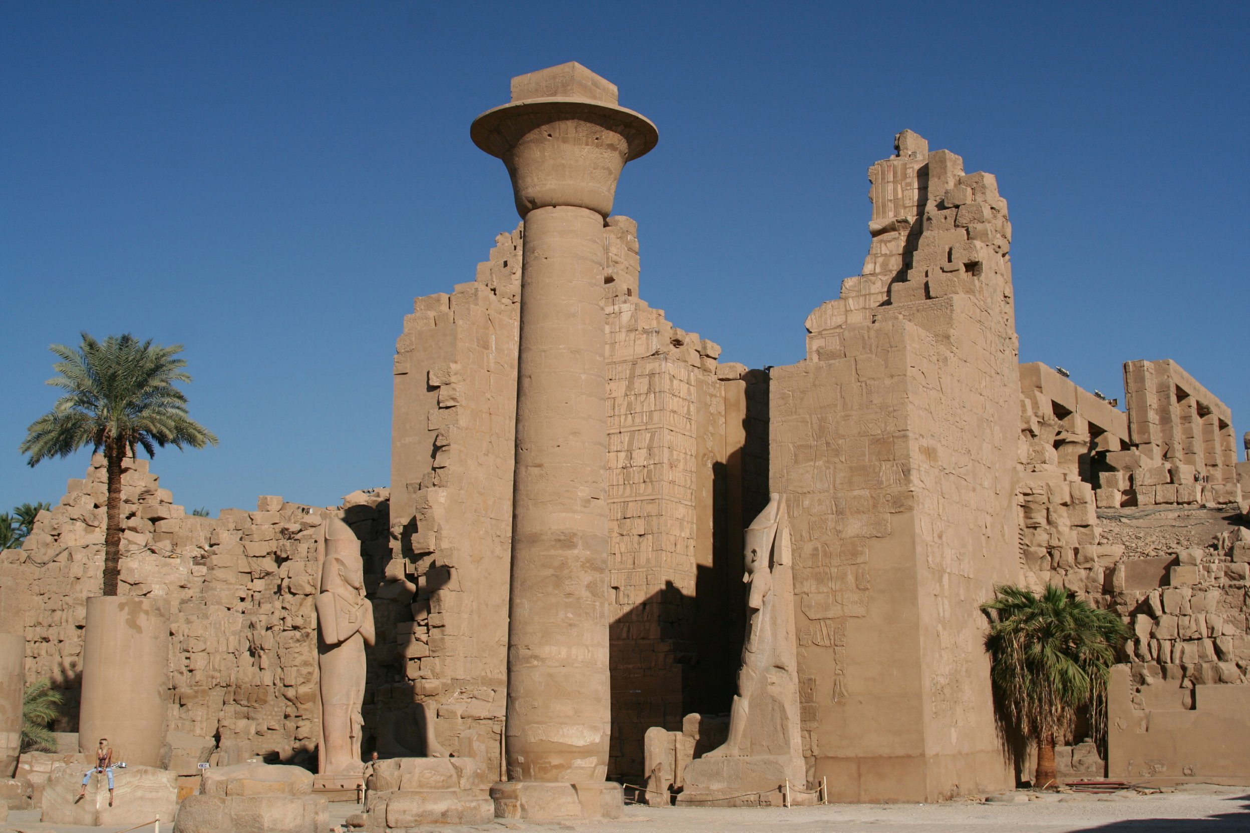 Pohled na Luxor